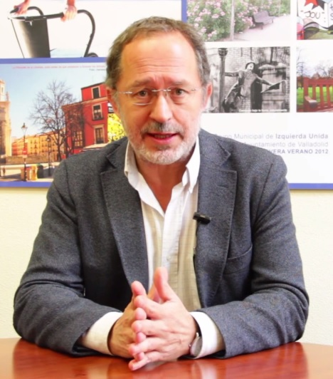 Manuel Saravia, portavoz de IU del Ayuntamiento de Valladolid.